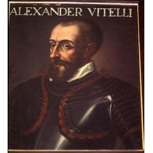 Ritratto di Alessandro Vitelli